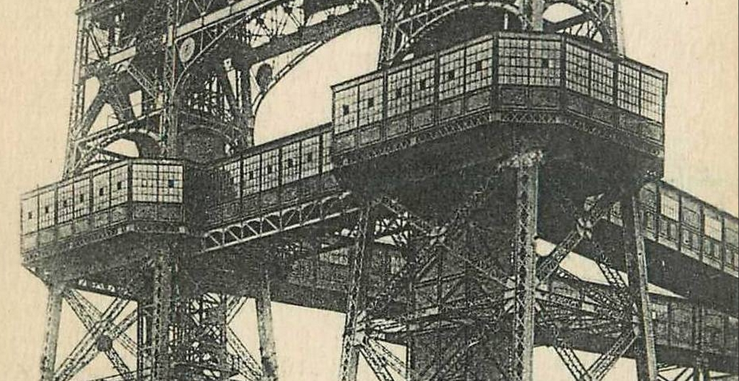 La fosse n° 15 - 15 bis de la Compagnie des mines de Lens était un charbonnage du bassin minier du Nord-Pas-de-Calais constitué de deux puits situé à Loos-en-Gohelle, Pas-de-Calais, Nord-Pas-de-Calais, France.